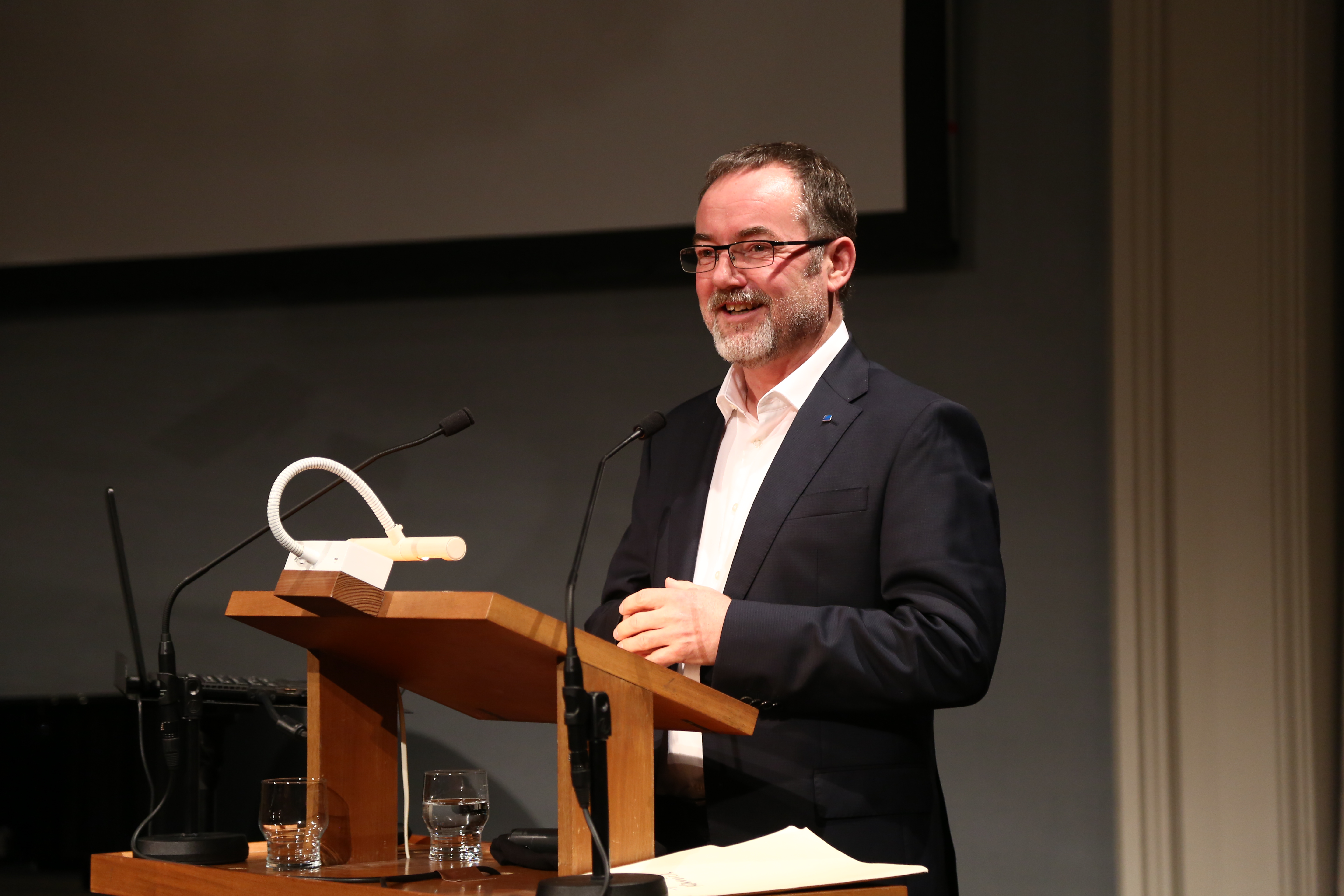 Udo Weilacher, Professor für Landschaftsarchitektur an der TU München Verleihung des Sckell-Ehrenrings durch die Bayerische Akademie der Schönen Künste an John Dixon Hunt. 19. Oktober 2017 in der Münchner Residenz.